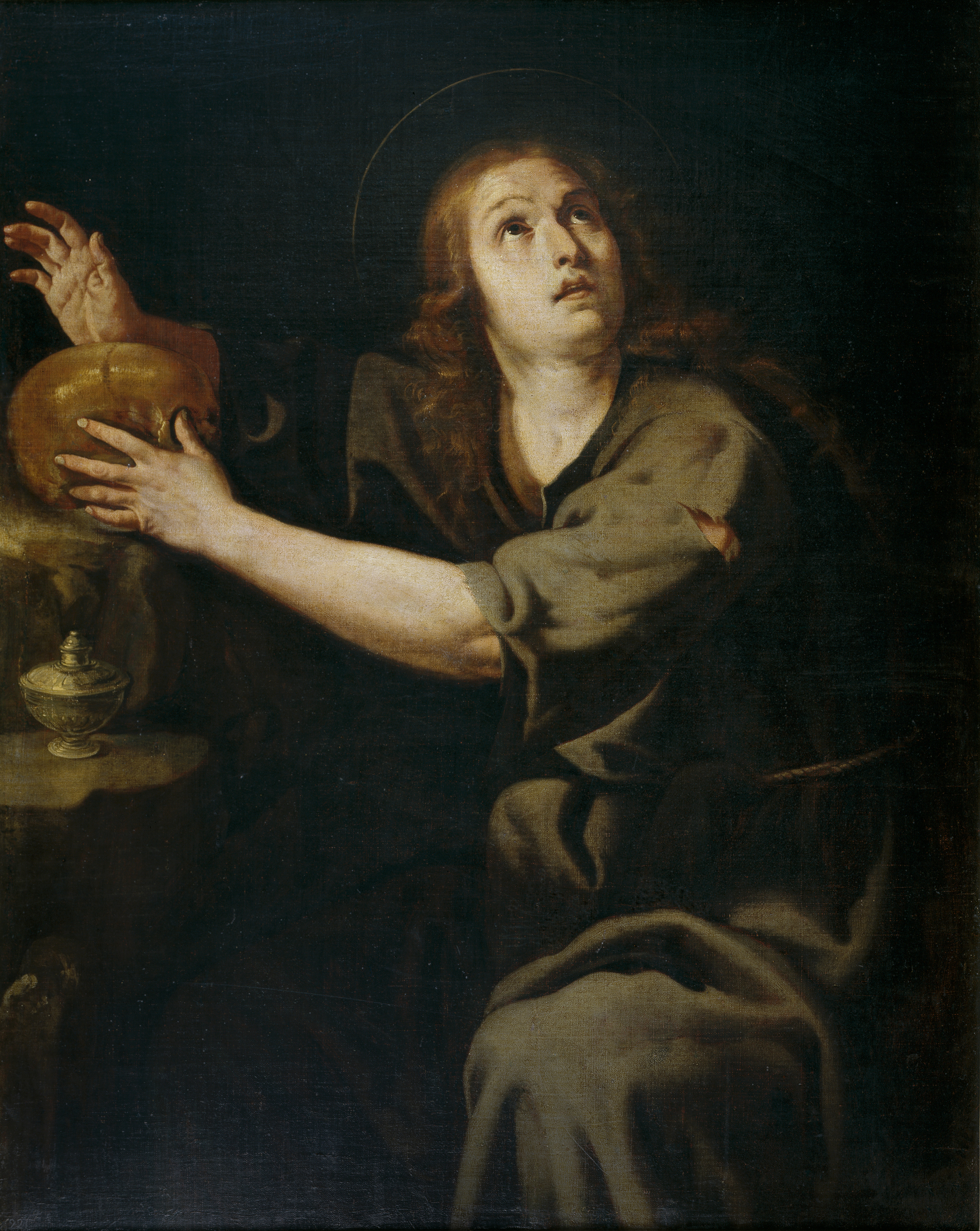 La obra representa a Santa María Magdalena en actitud penitente.